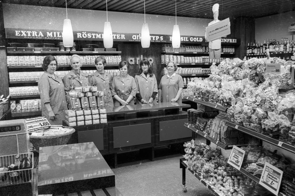 Arko-Geschäft in der Holtenauer Straße 146